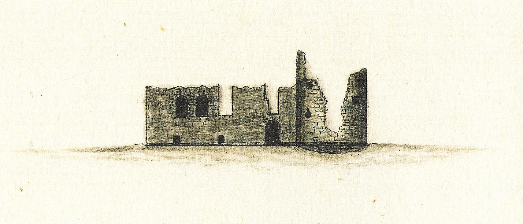 Kiviloo linnus, vaade idast. Paulucci album